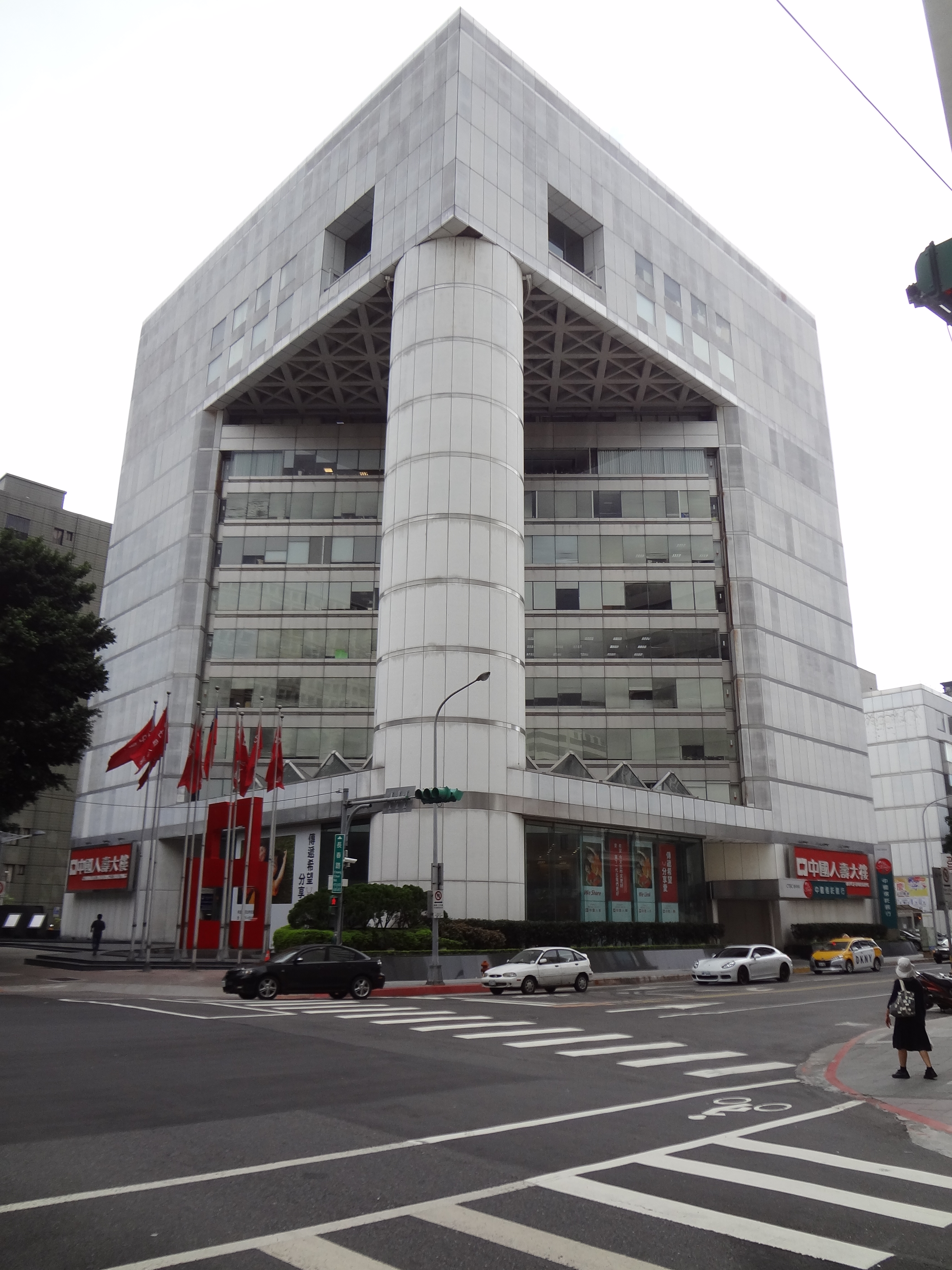 中國人壽敦北大樓，位於臺北市松山區敦化北路122號（敦化北路與長春路口）。